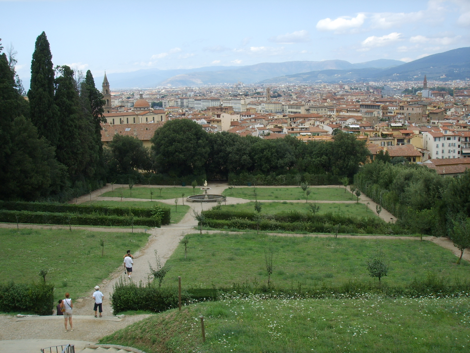 Boboli, prato di ganimede